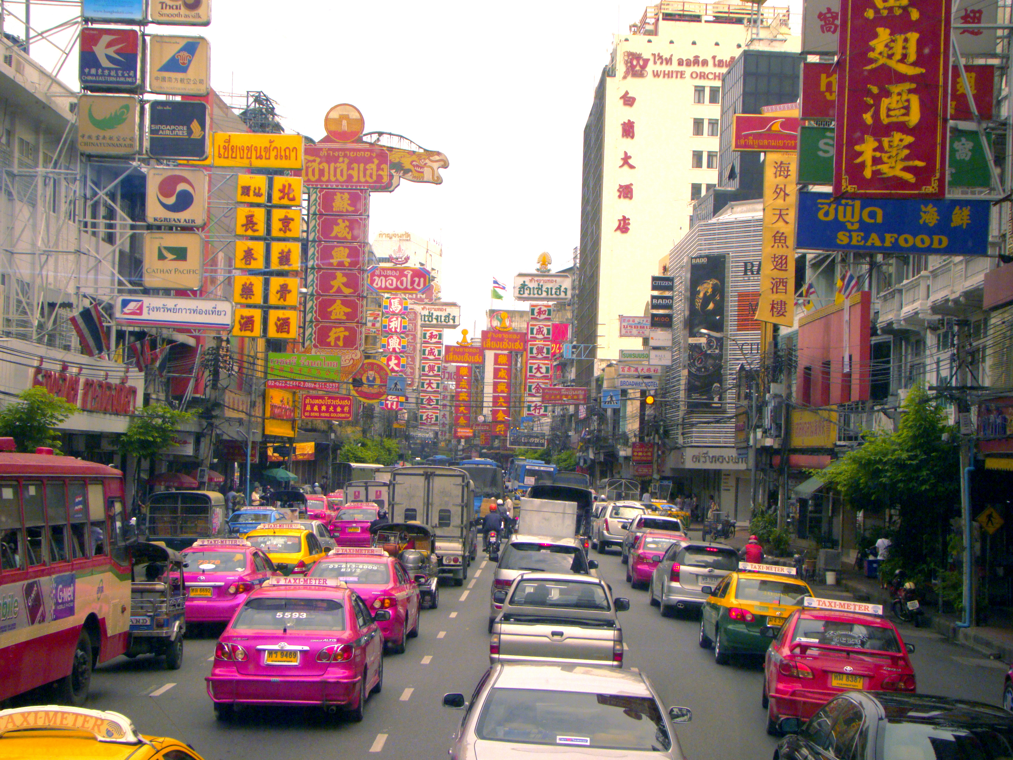 China town,Bangkok